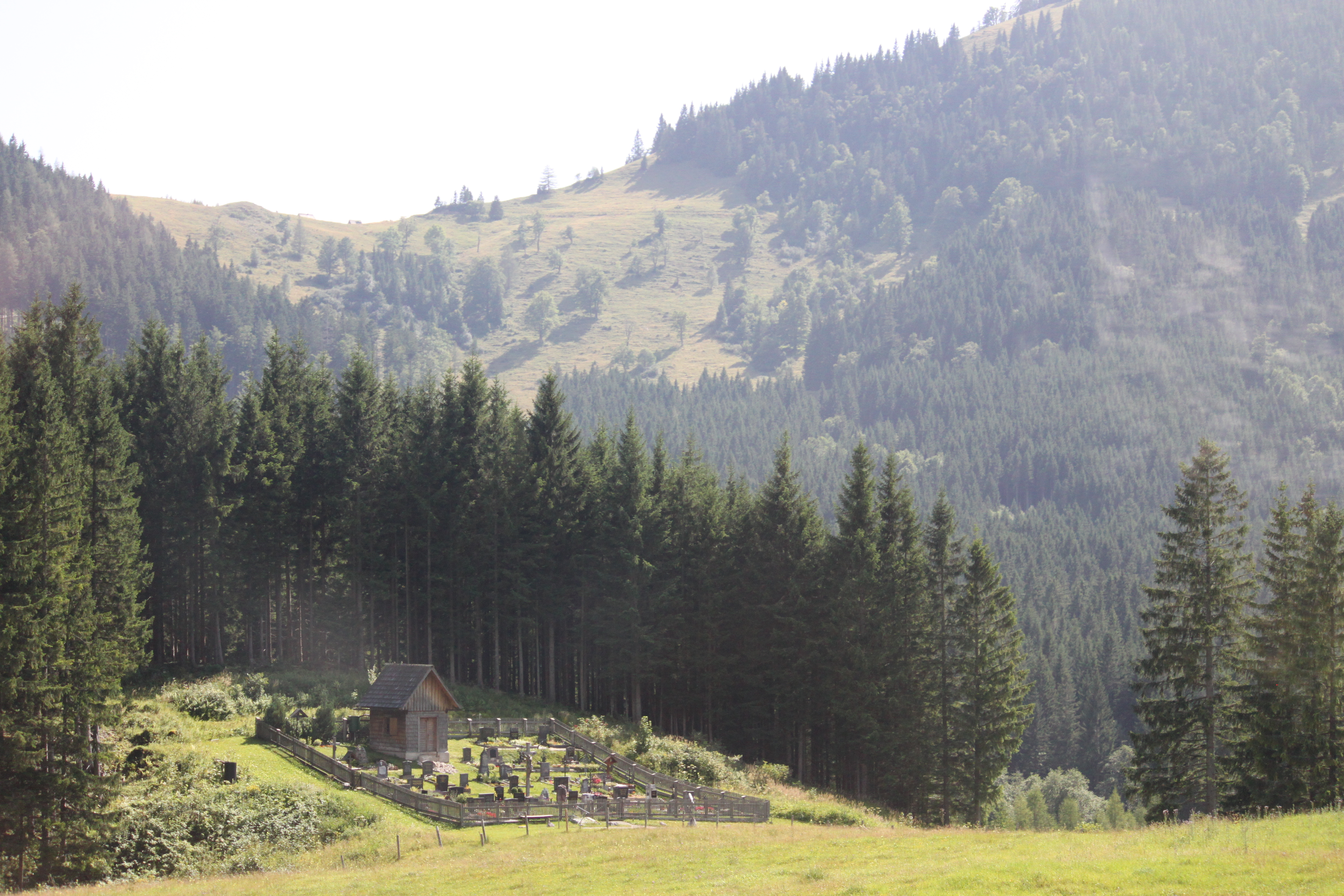 Der Ortsfriedhof des Dorfes Lahnsattel in der Gemeinde St. Aegyd am Neuwalde